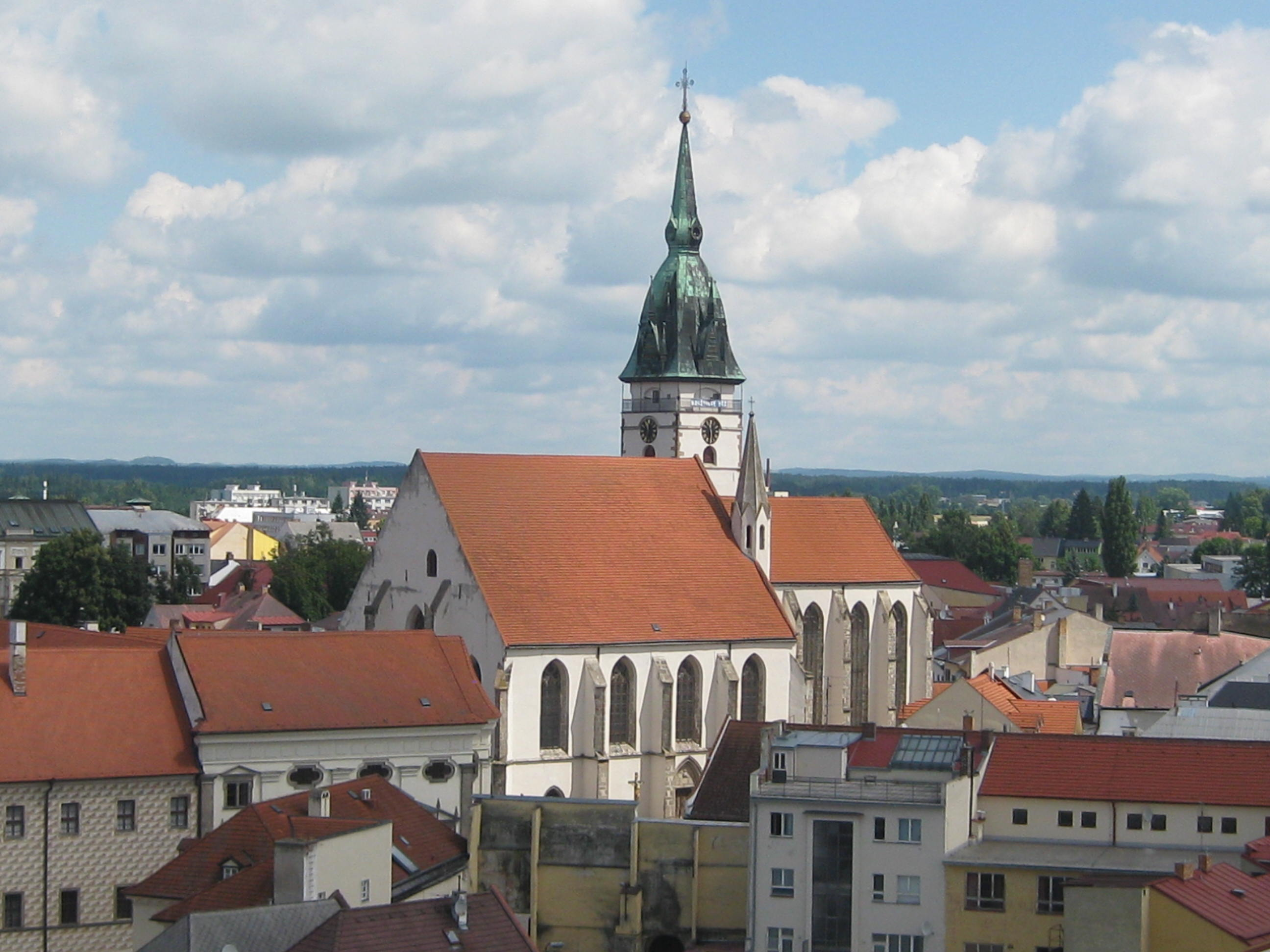 Jindřichův Hradec, kostel Nanebevzetí Panny Marie, pohled z věže zámku